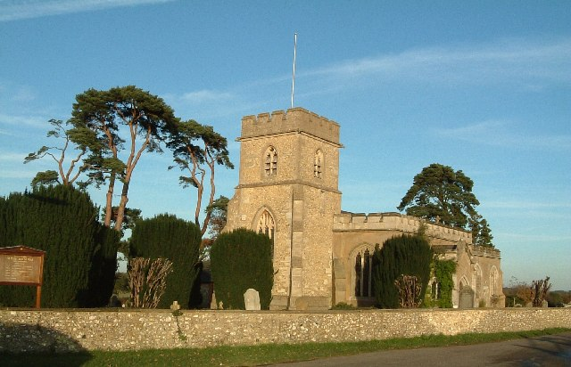 Little Gaddesden - Church